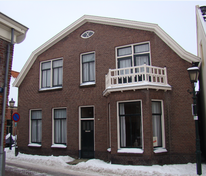 Gemeentemonument in Bredevoort